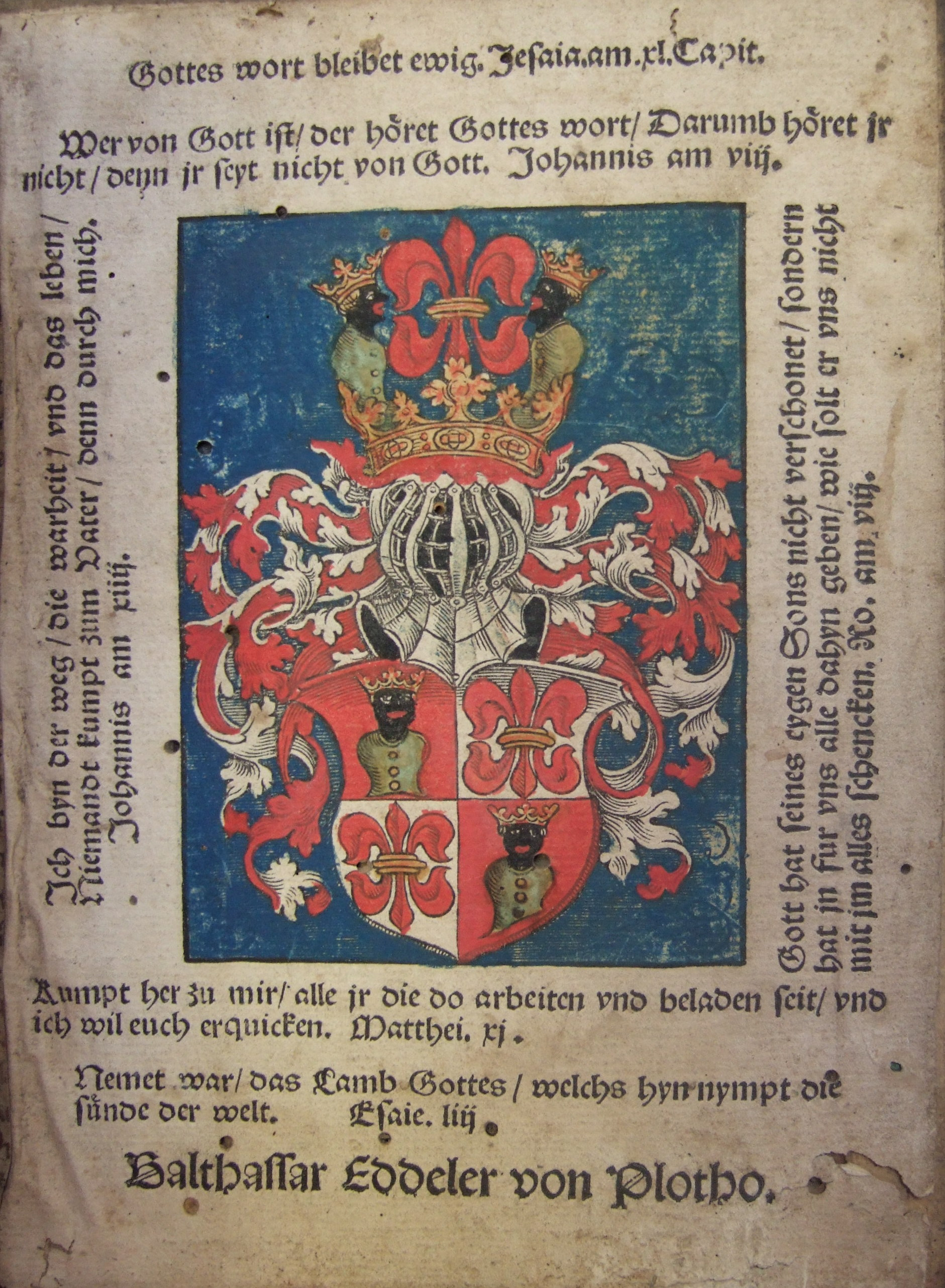 Ex libris se trouvant sur le second contre-plat d'un livre de Martin Luther conservé à la médiathèque protestante de Strasbourg (P16-1366)